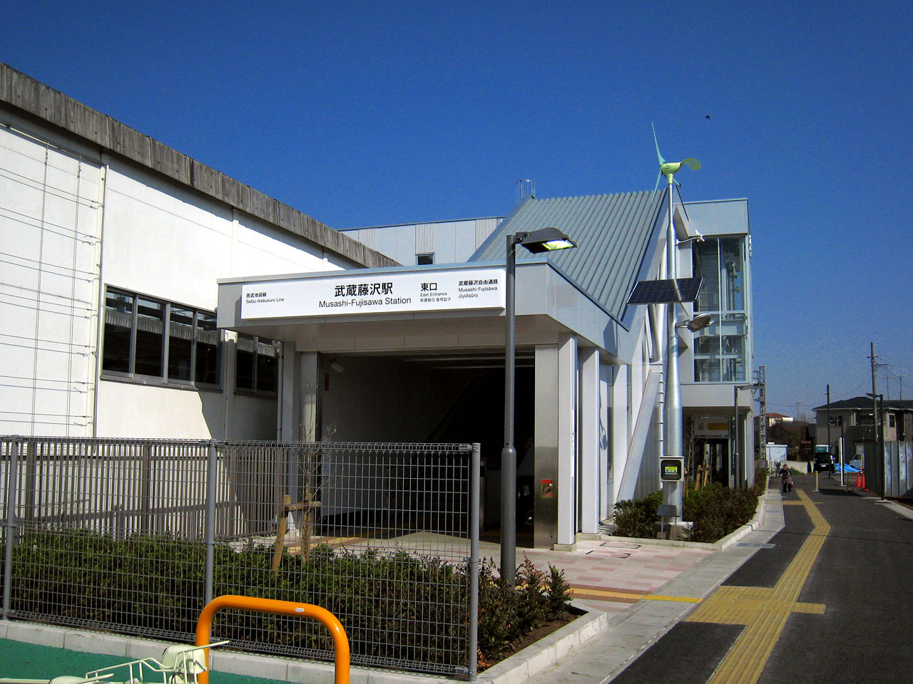 武蔵藤沢駅東口